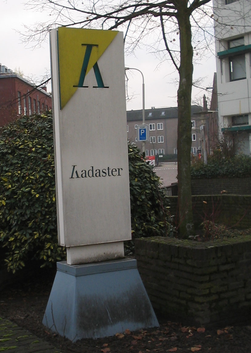 Zicht op het oude logo van het Kadaster (in gebruik tot 2007) bij de voormalige vestiging van het Kadaster Breda aan de Markendaalseweg 44 in Breda